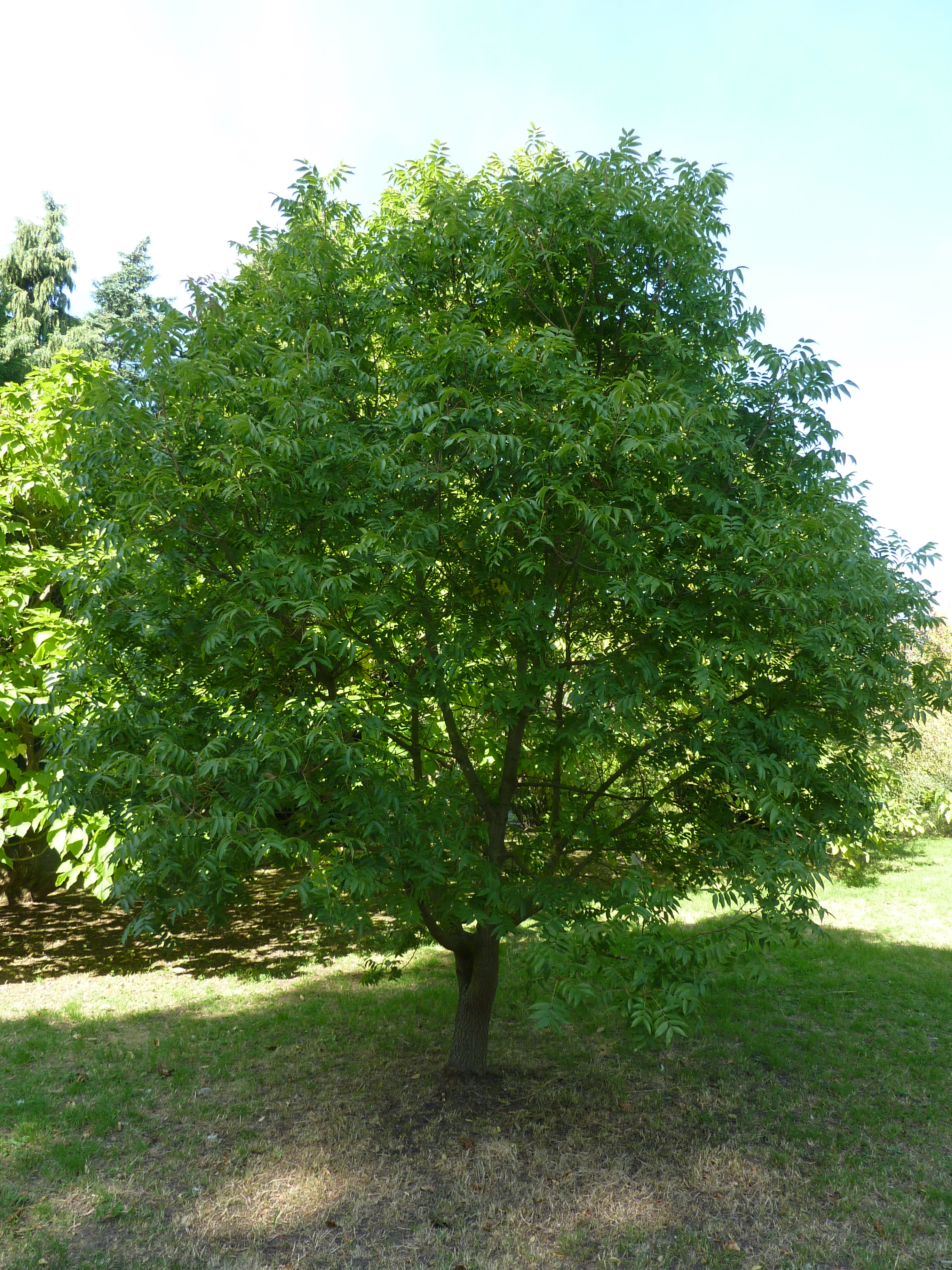 Pistacia chinensis, Anacardiaceae